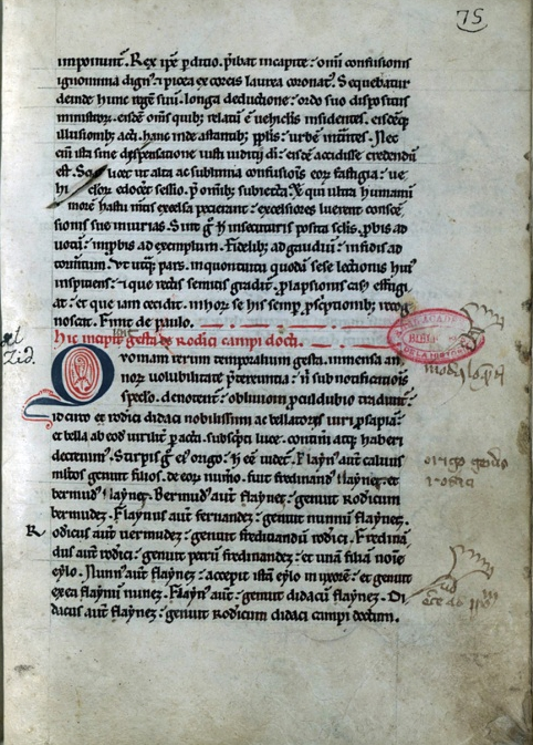 Íncipit (fol. 75r.º) de la Historia Roderici (Hic incipit Gesta Roderici Campidocti, miniado en tinta roja) del códice conservado en la Biblioteca de la Real Academia de la Historia, signatura 9/4922 (olim A-189), que contiene los textos: Chronica Naiarensis Historia Wambae Historia Roderici Ordo regum Naiarensis